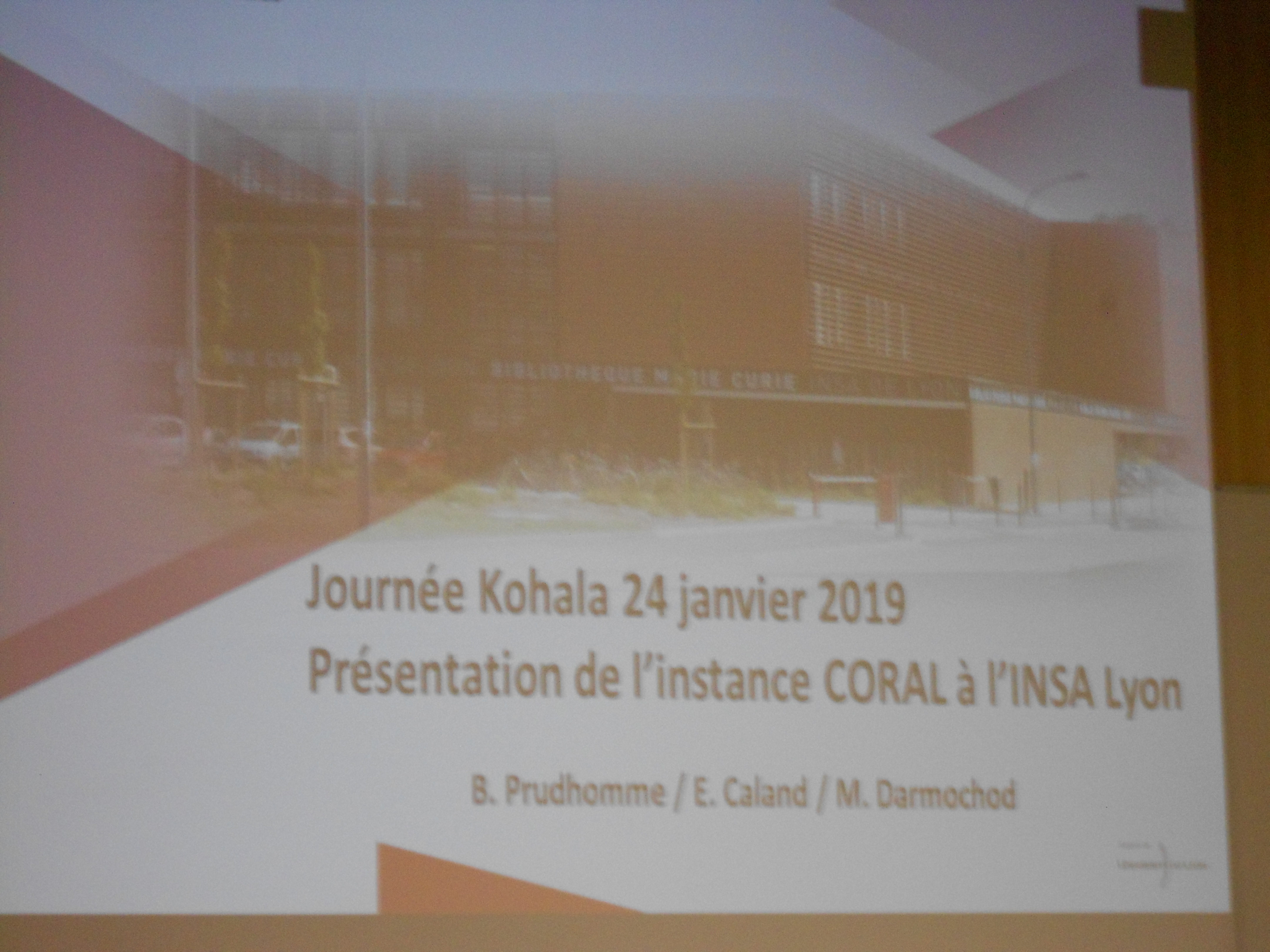 Journée KohaLa à l'Enssib, Villeurbanne. 2019-01-24.